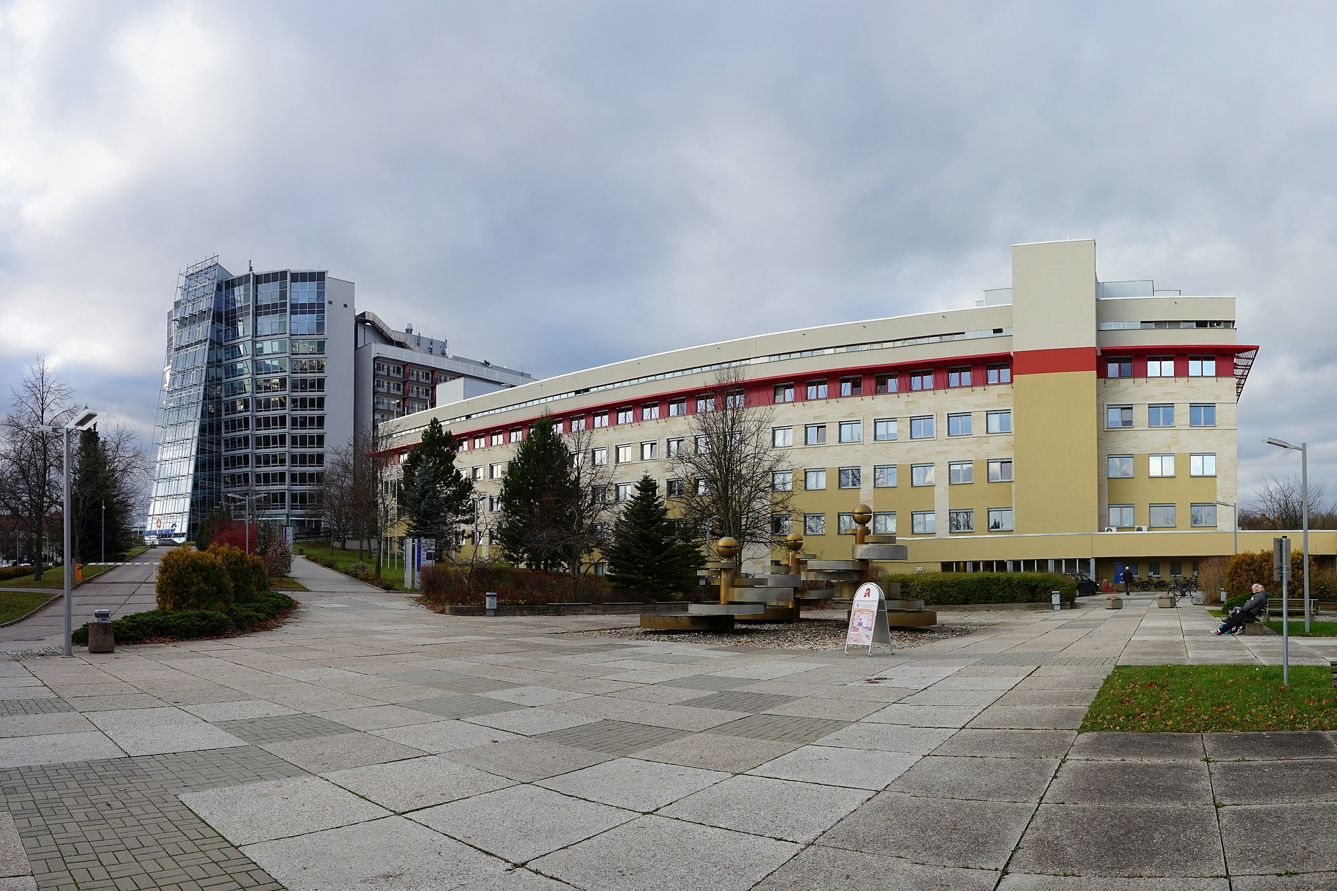 Das Klinikum Chemnitz, der Klinikkomplex an der Flemmingstraße